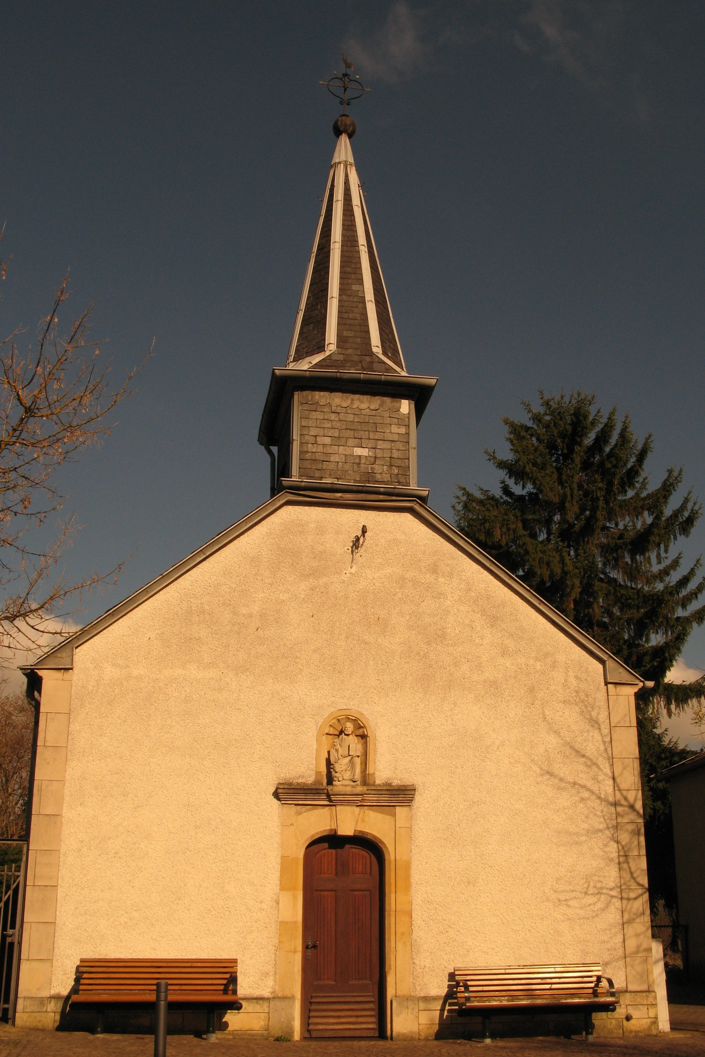 D'Lukaskapell zu Butschebuerg (2008). Kategorie:Kapellen zu Lëtzebuerg Kategorie:Gemeng Diddeleng